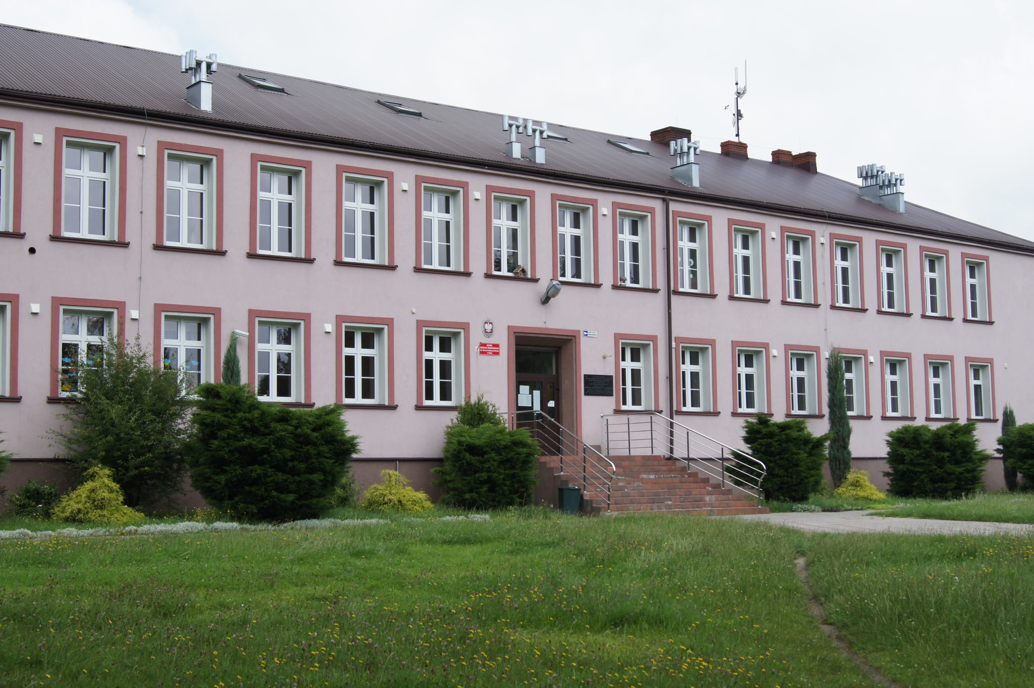 Szkoła podstawowa znajdująca się w Kalei